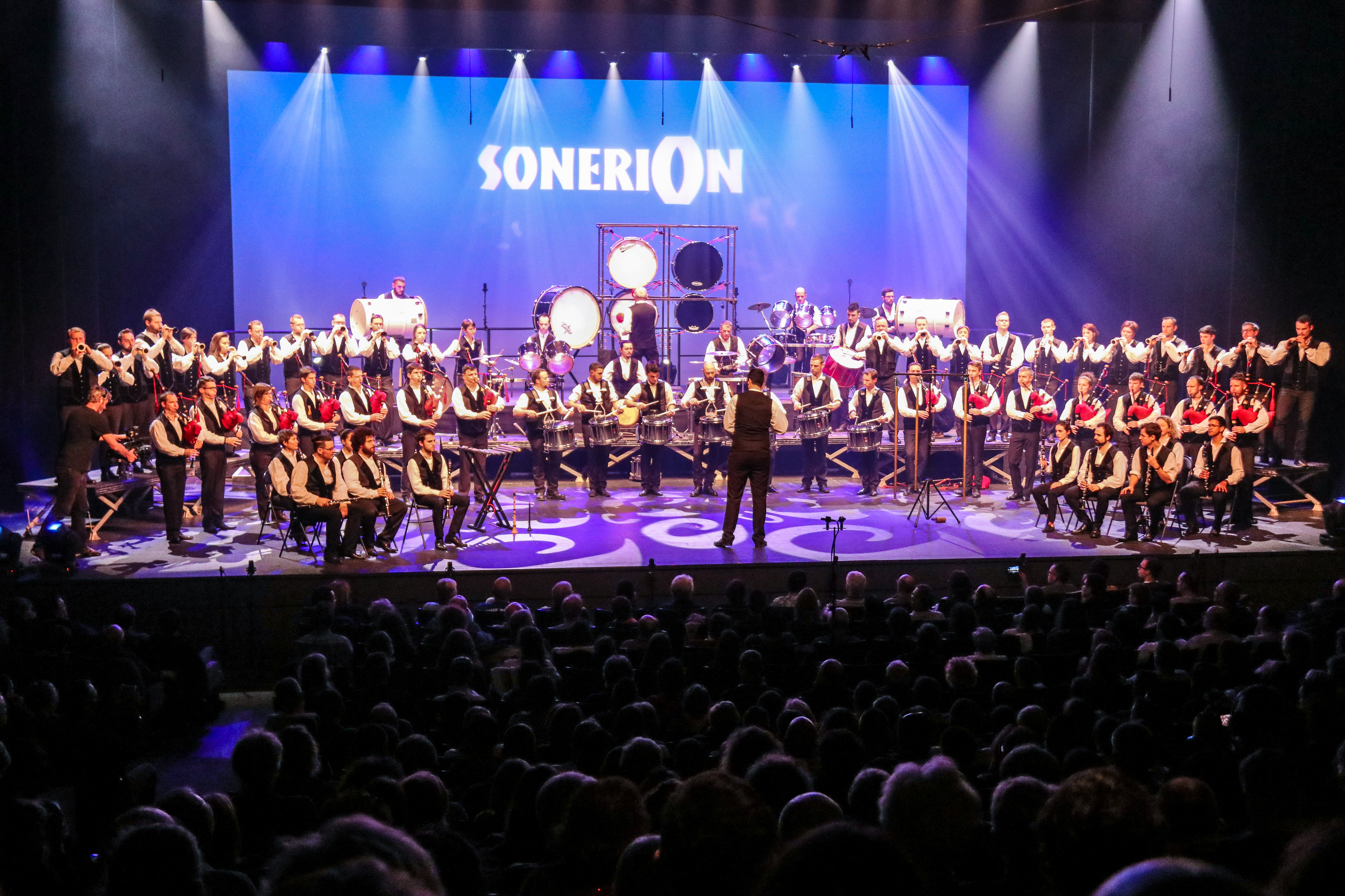 Epreuve d'hiver du Championnat national des bagadoù de Première catégorie organisée au Quartz à Brest le 10 février 2019.